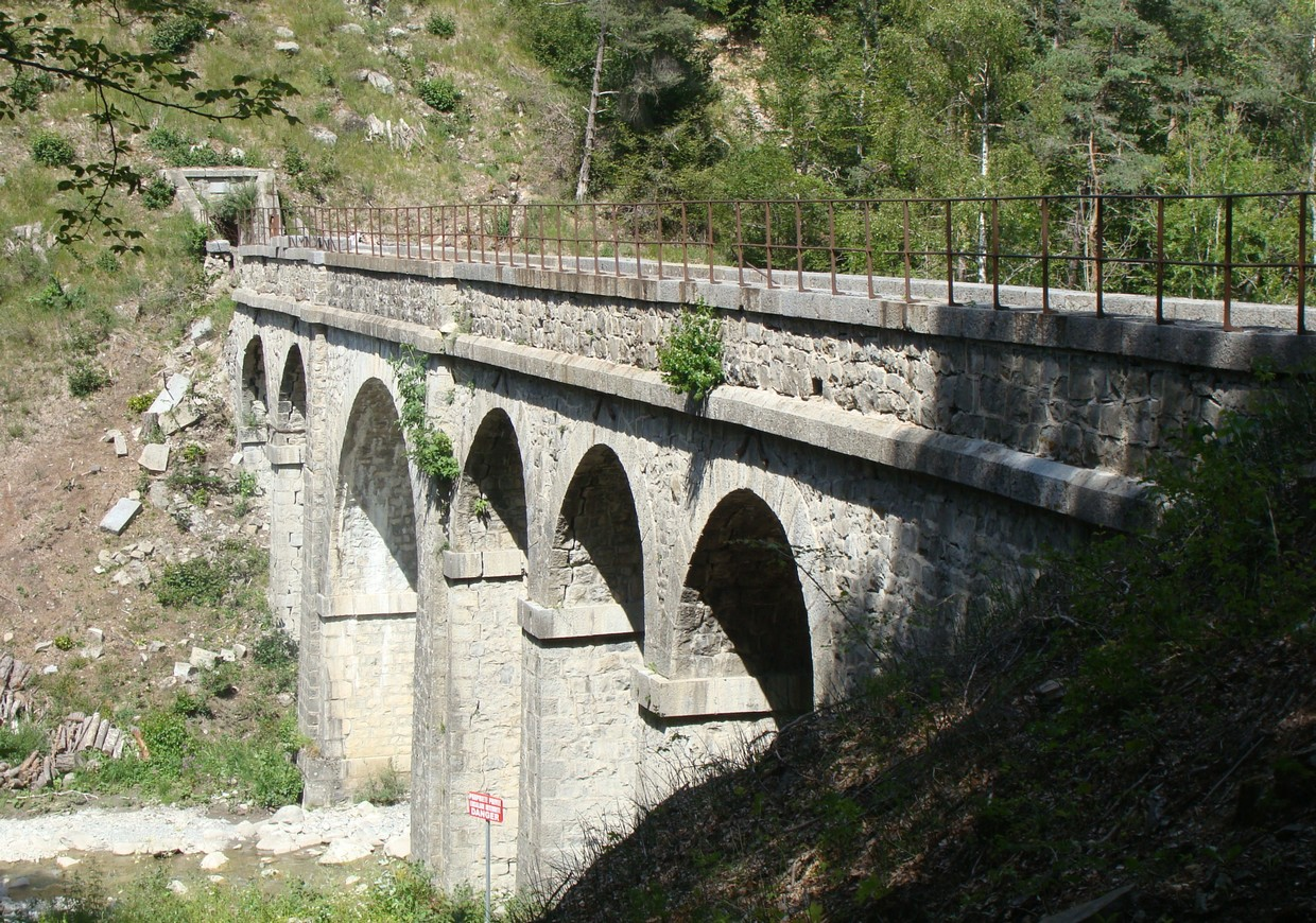 L'aqueduc vu de l'aval rive gauche, avant travaux. Un premier nettoyage des abords a fait apparaître la détérioration de l'avant-pont rive droite.